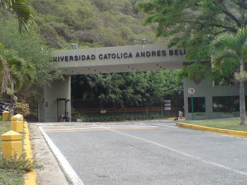 Entrada de la Universidad Católica Andres Bello (UCAB)